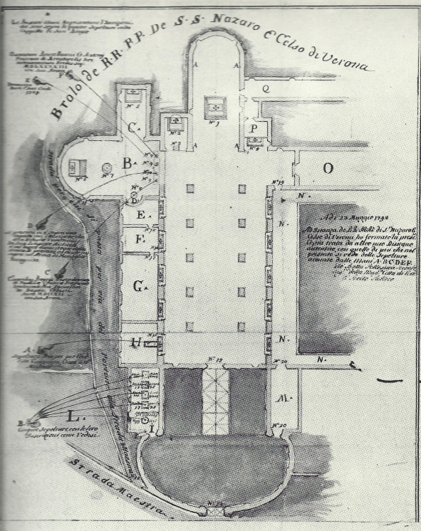 Planimetria della Chiesa dei Santi Nazaro e Celso a Verona